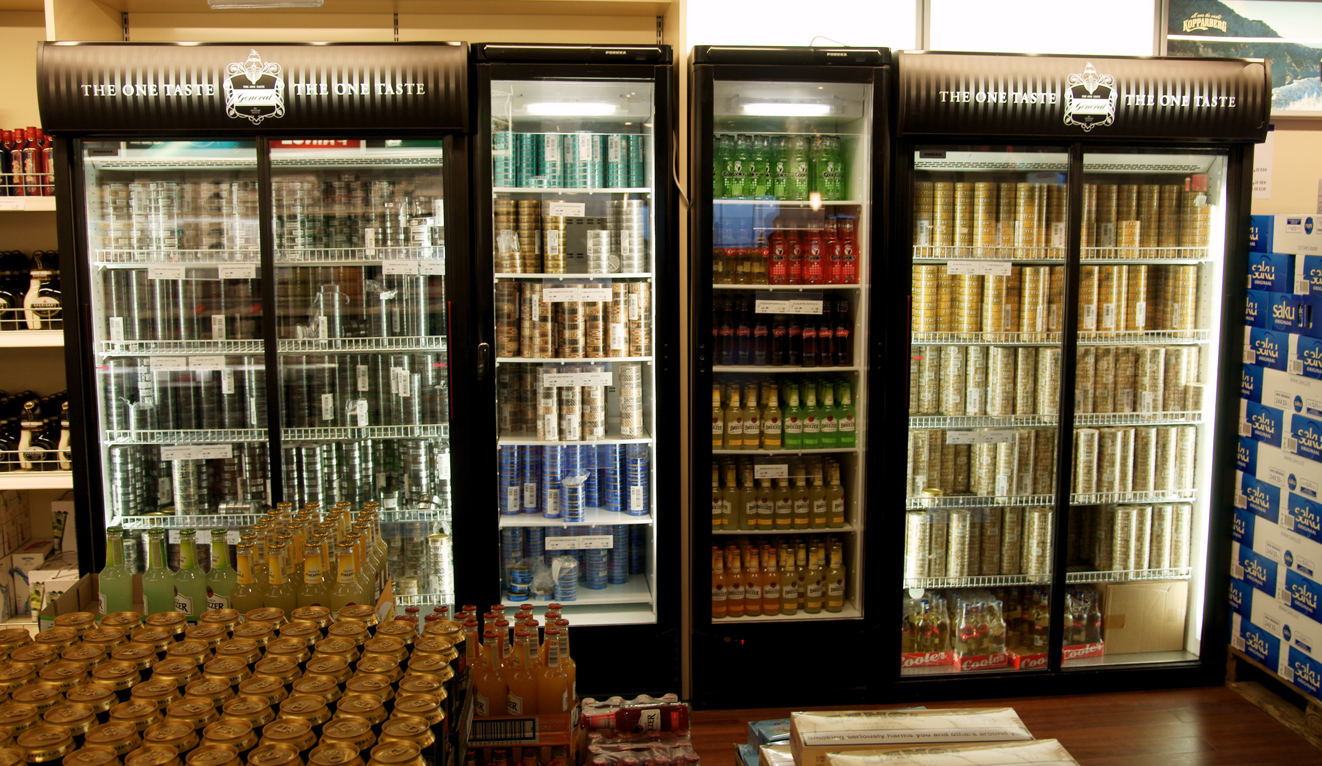 Nuuskajääkaappeja MS Baltic Princessin taxfreessä.